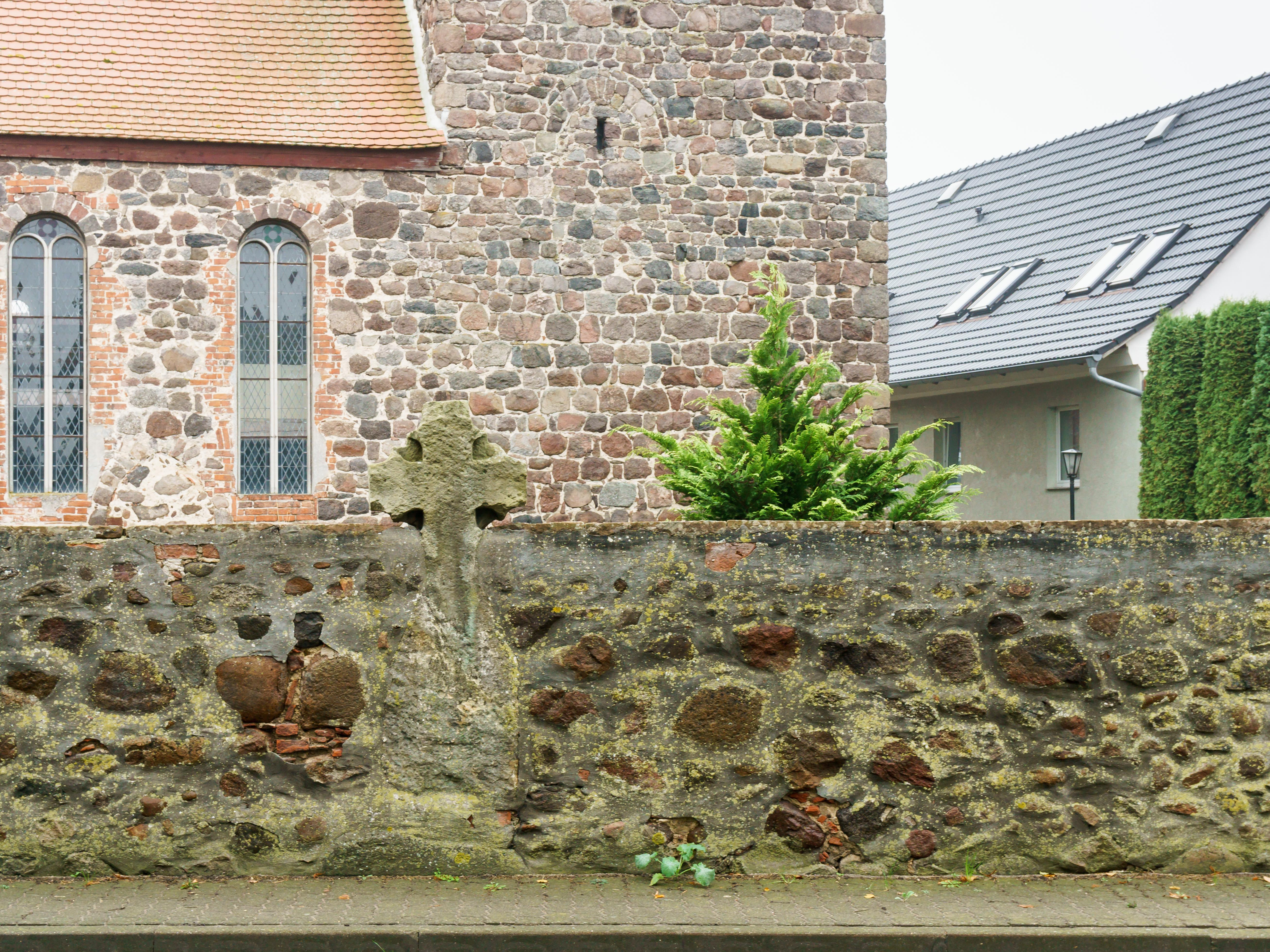 Gotisches Kreuz, teilweise eingemauert in der Kirchhofsmauer von Klein Schwechten